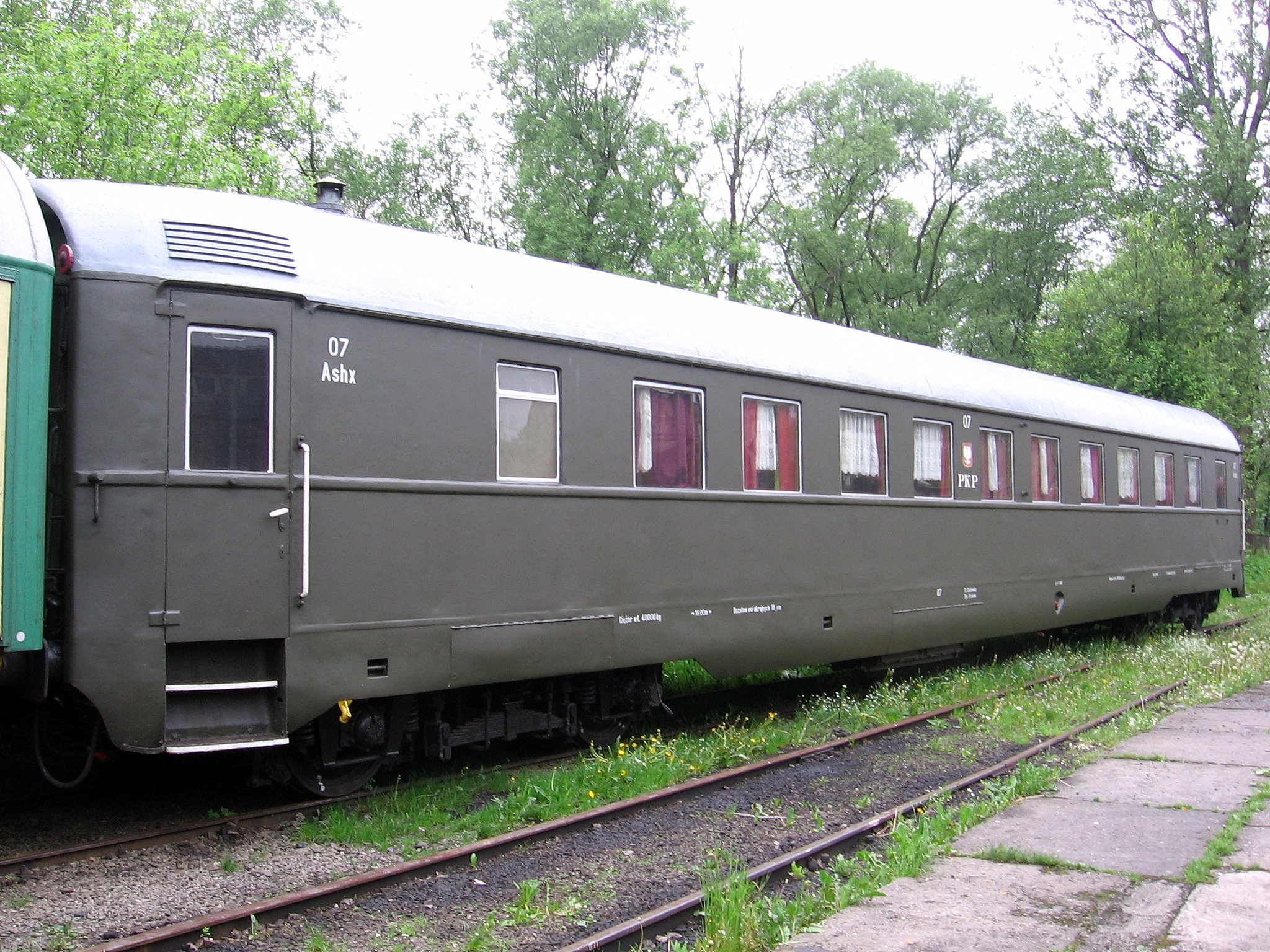 wagon-salonka